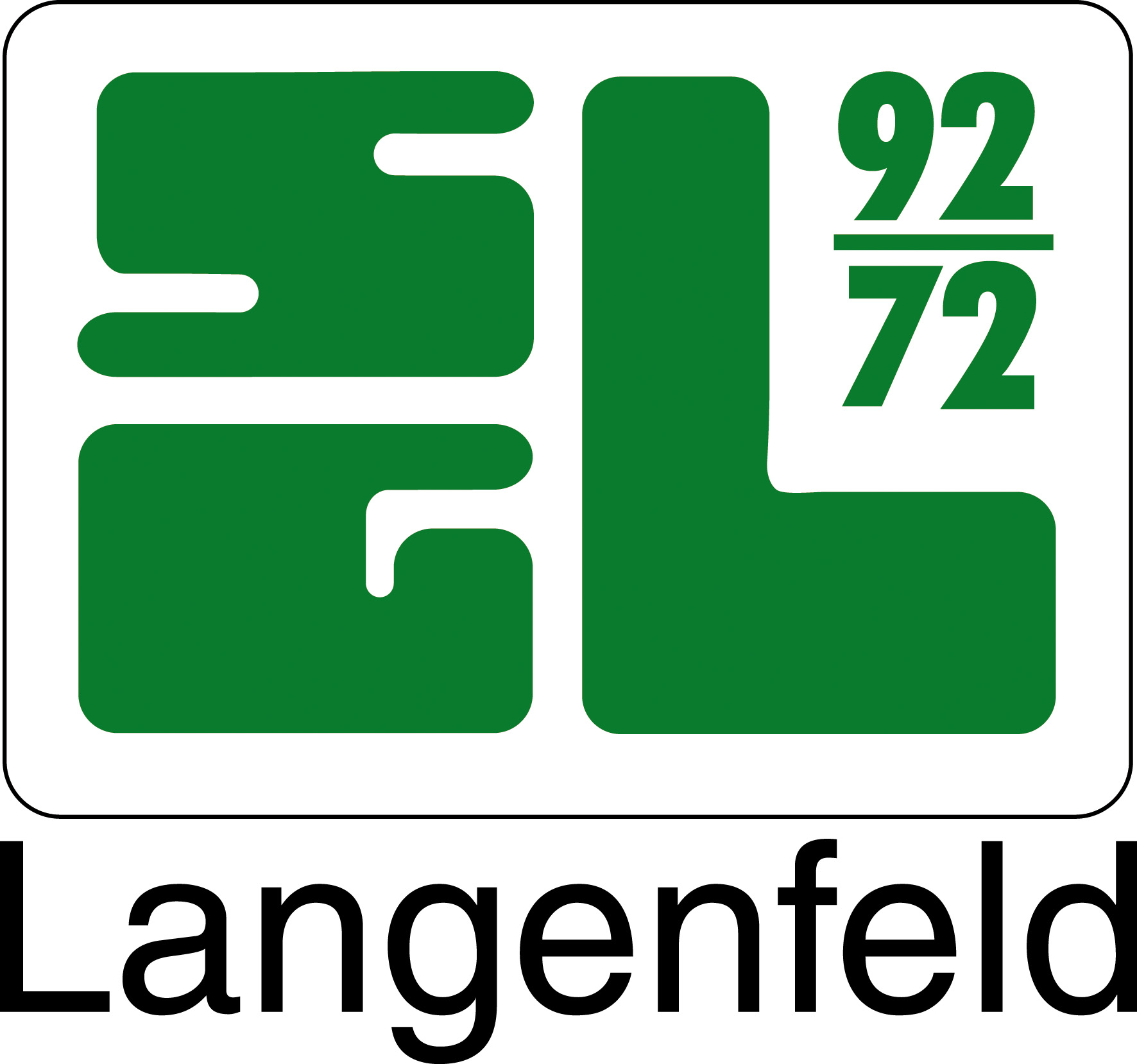 Vereinslogo der Sportgemeinschaft Langenfeld 92/72 e.V.